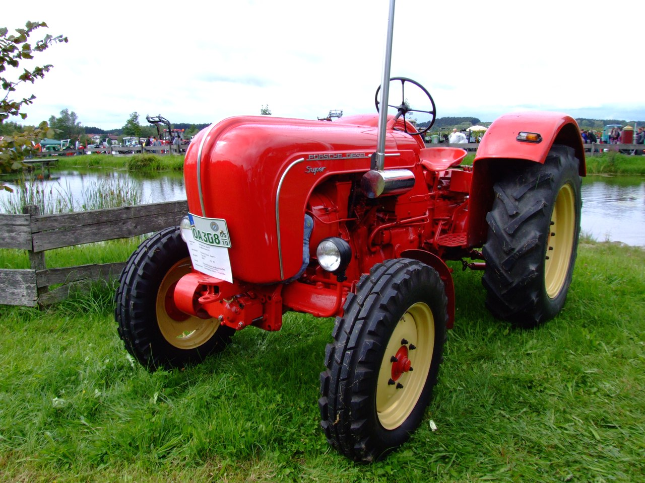 Porsche Super L 319 mit 40 PS, Baujahr 1962, zul. Gesamtgewicht: 3390 kg, zul. Achsdruck vorn: 1250 kg, zul. Achsdruck hinten: 2140 kg; Besonderheit: Schnellgang 30 km/h - Frontlader